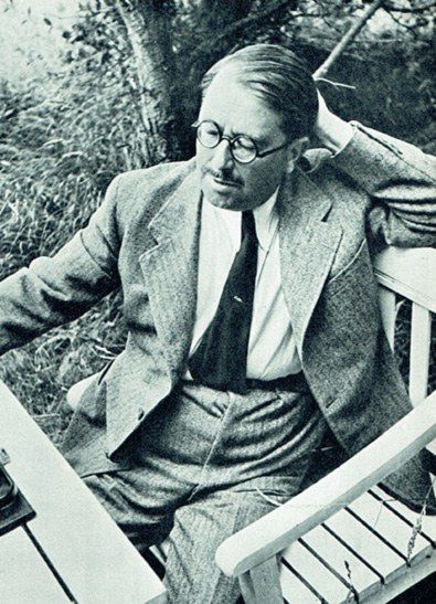 Gunnar Serner AKA Frank Heller (1886-1947)